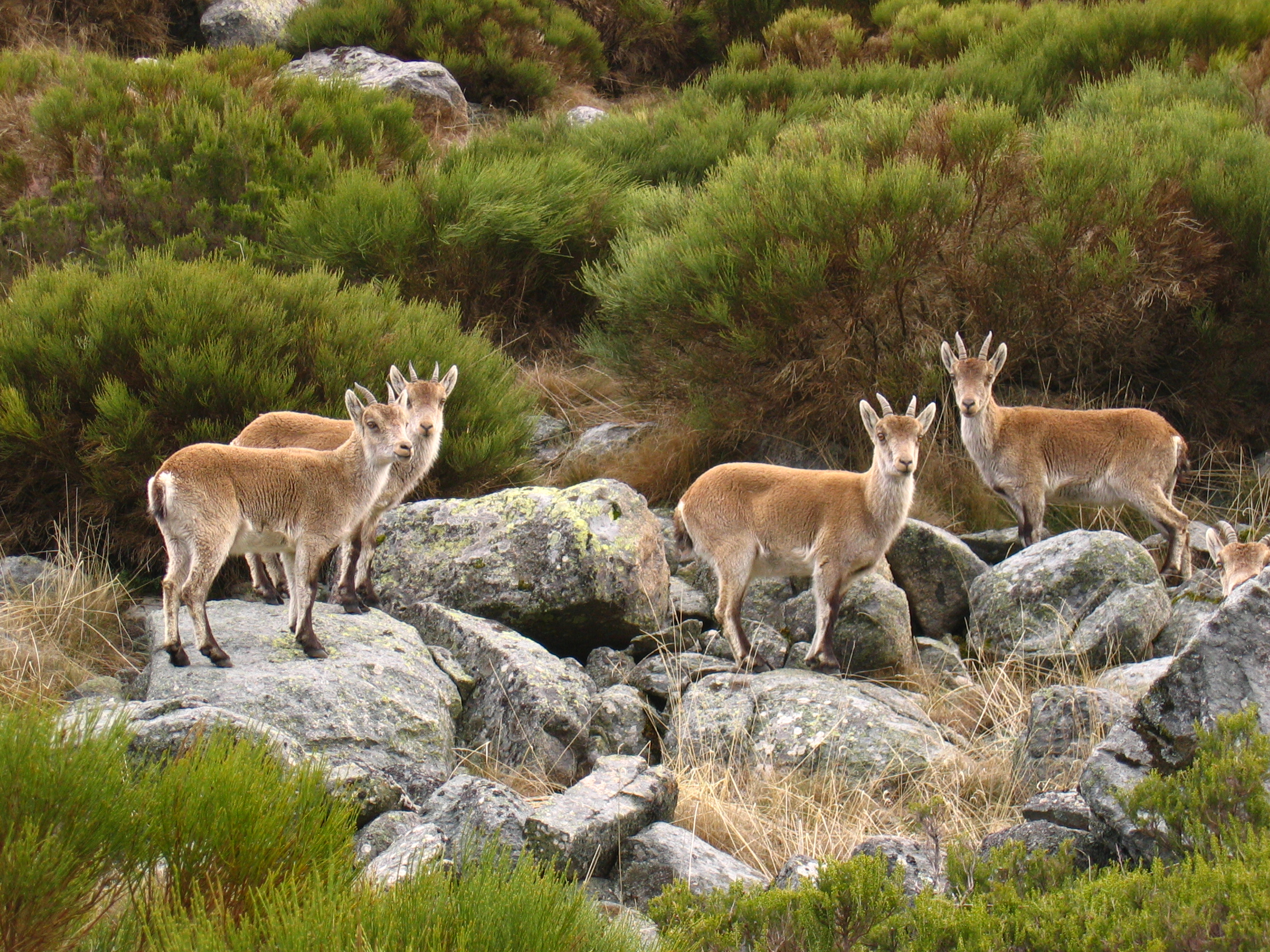 Grupo de Capra pyrenaica victoriae